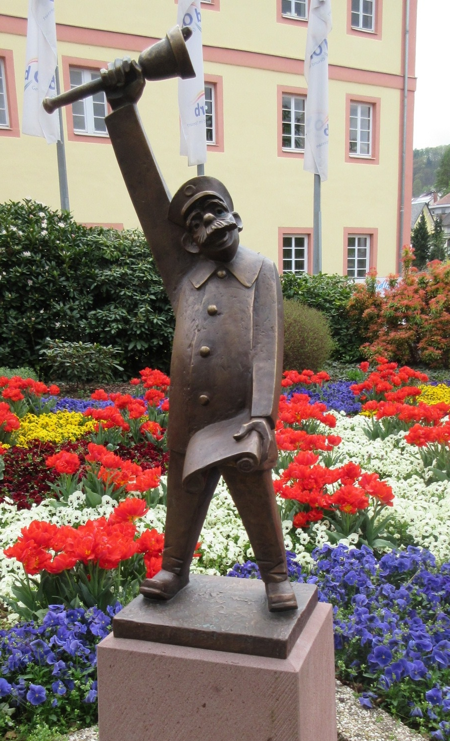 Ausrufer, von Hans Prasch vor ehemaligem Rathaus